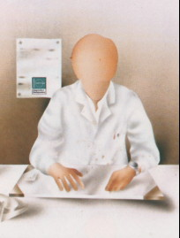 Schreibtischhaltung des Autogenen Trainings